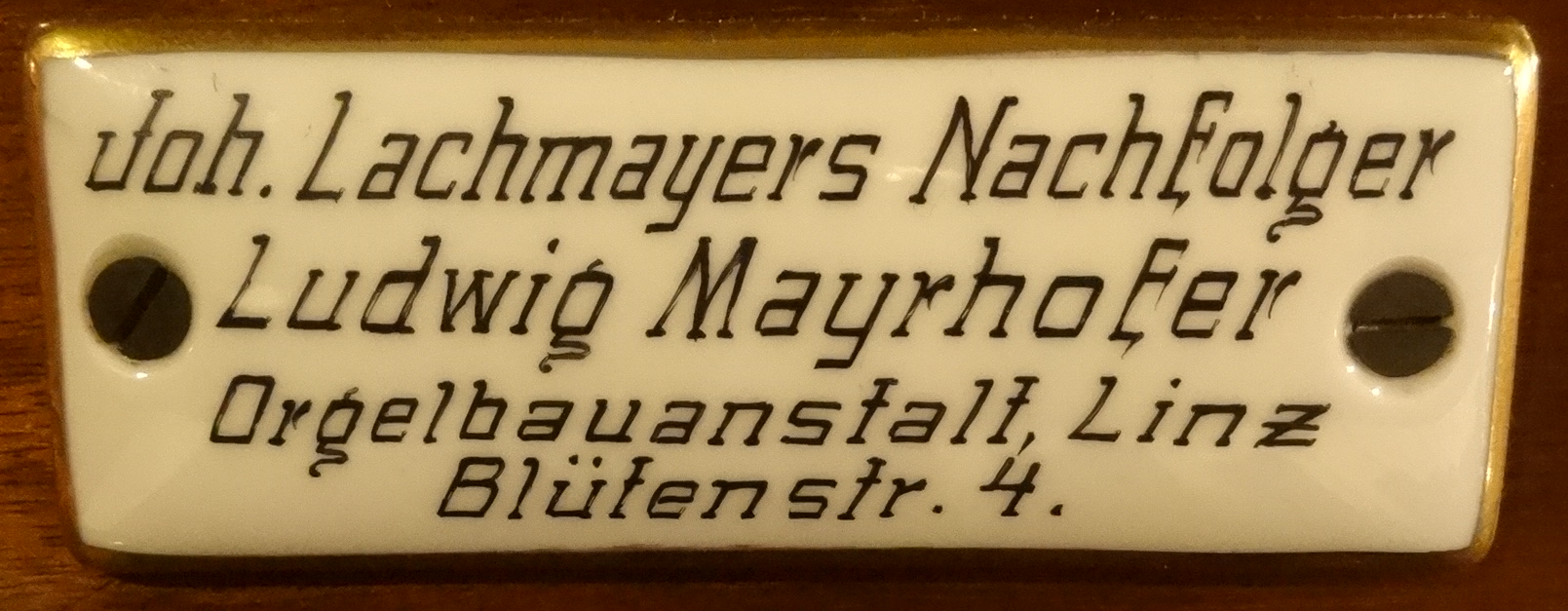 Das Firmenschild an der 1928 von Ludwig Mayrhofer erbauten Orgel in Überackern